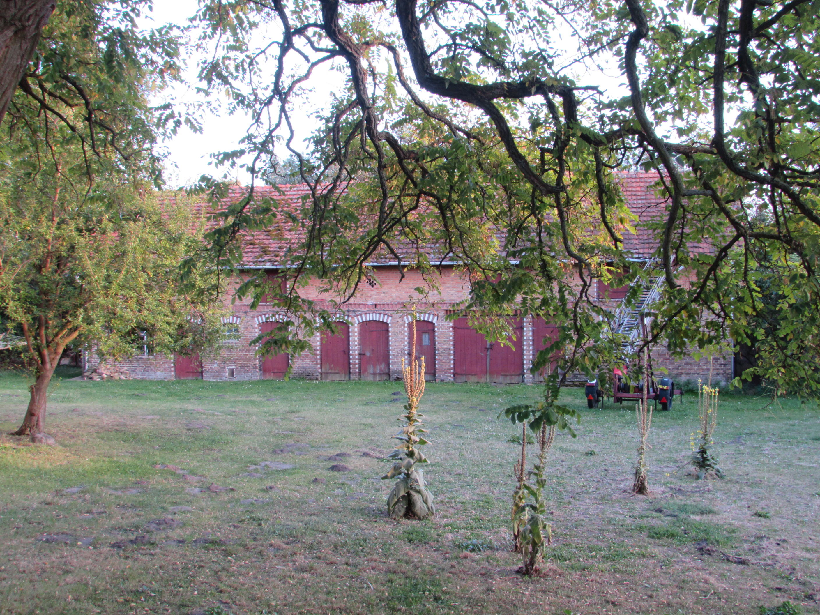 stallgeböude des pfarrhauses hohenferchesar